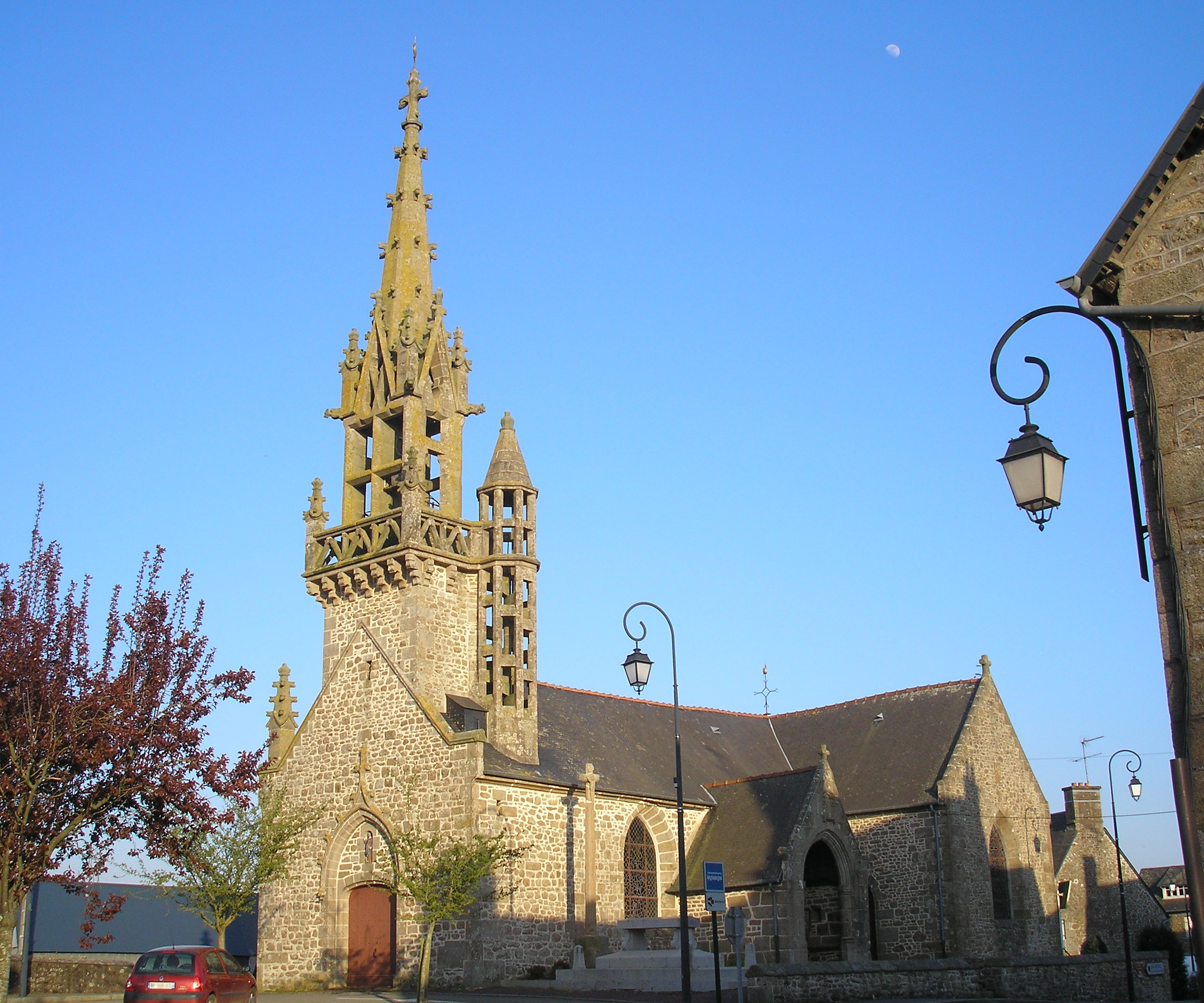 Monthault (Bretagne, France). L'église Saint-Pierre.